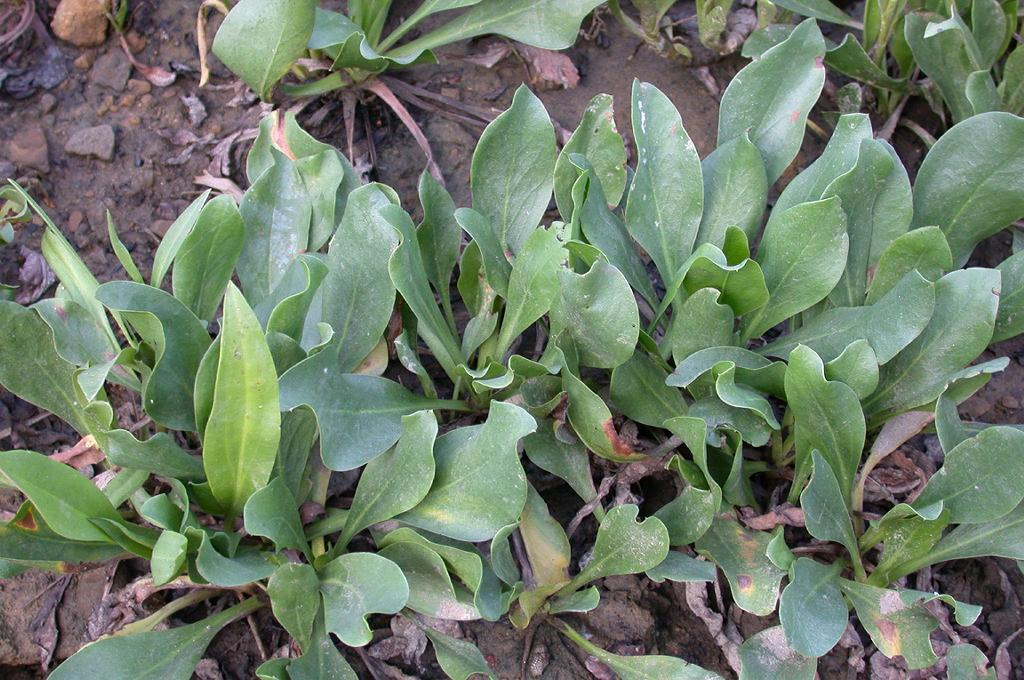 2003/09/13 和歌山県白浜町：Shirahama Town. Wakayama Pref. Japan